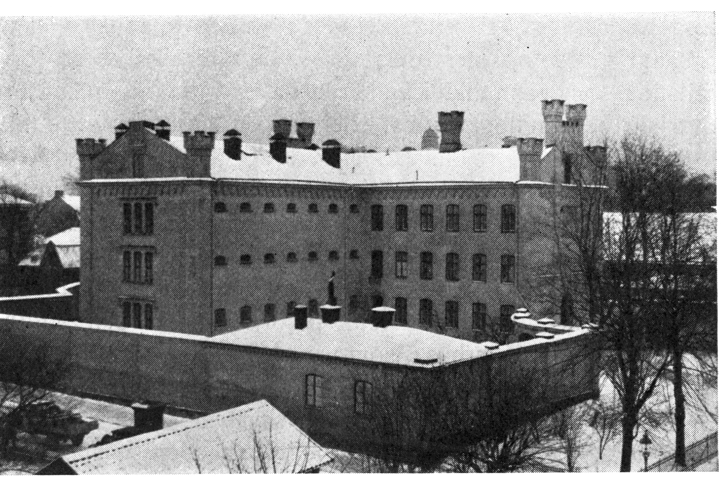 Länsfängelset i Örebro